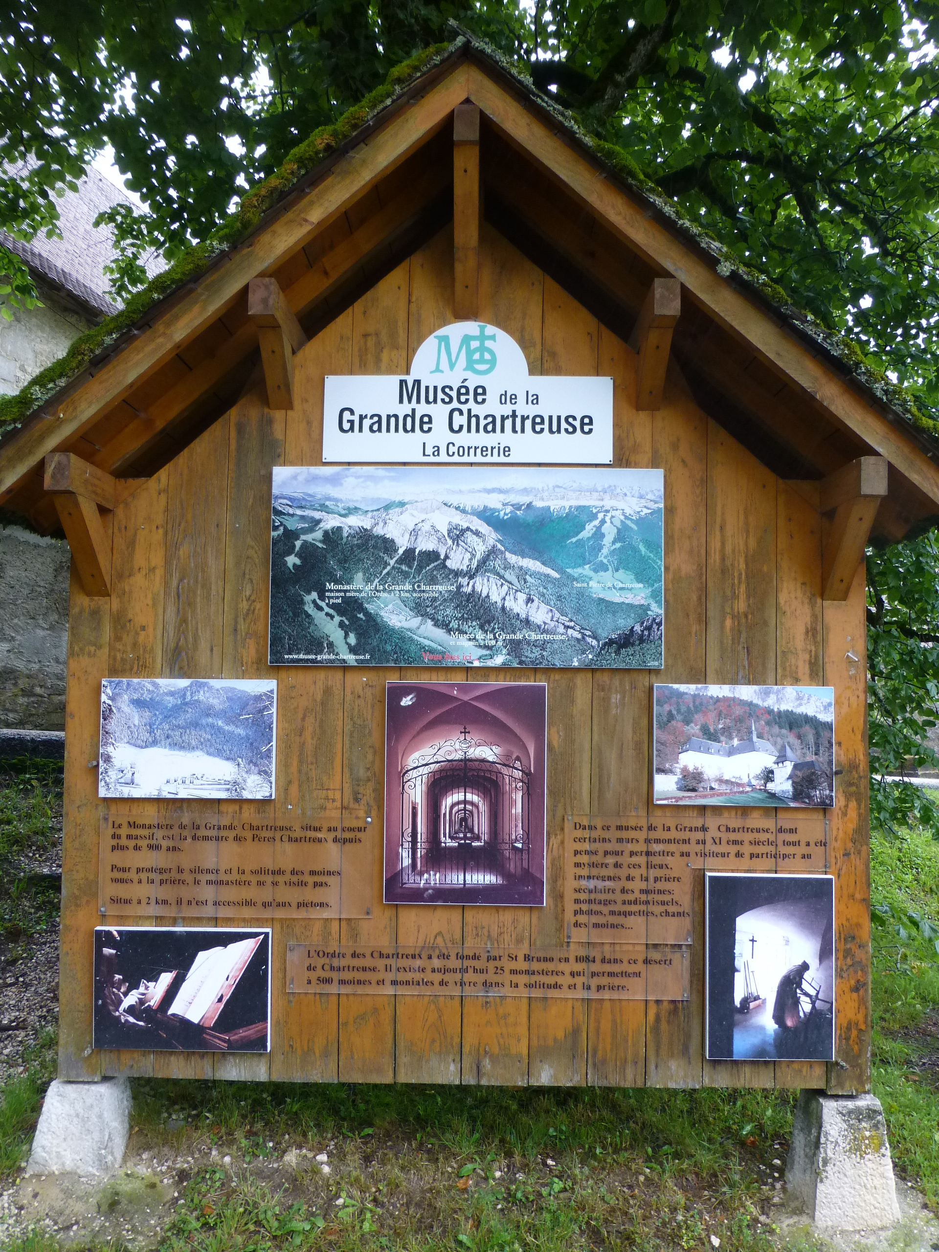 Affichage du Musée de la Grande Chartreuse à Saint-Pierre-de-Chartreuse